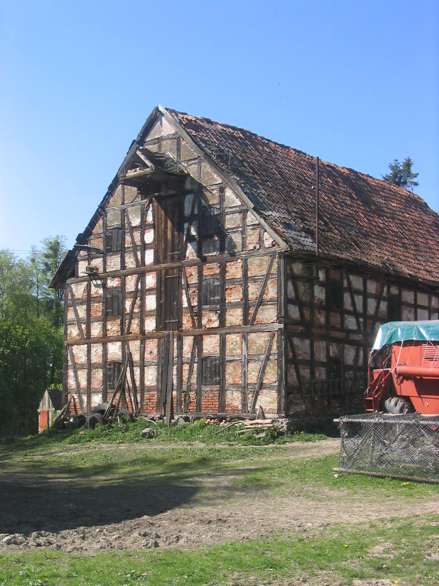 Spichlerz w Garbnie (Garbonii), gmina Barciany